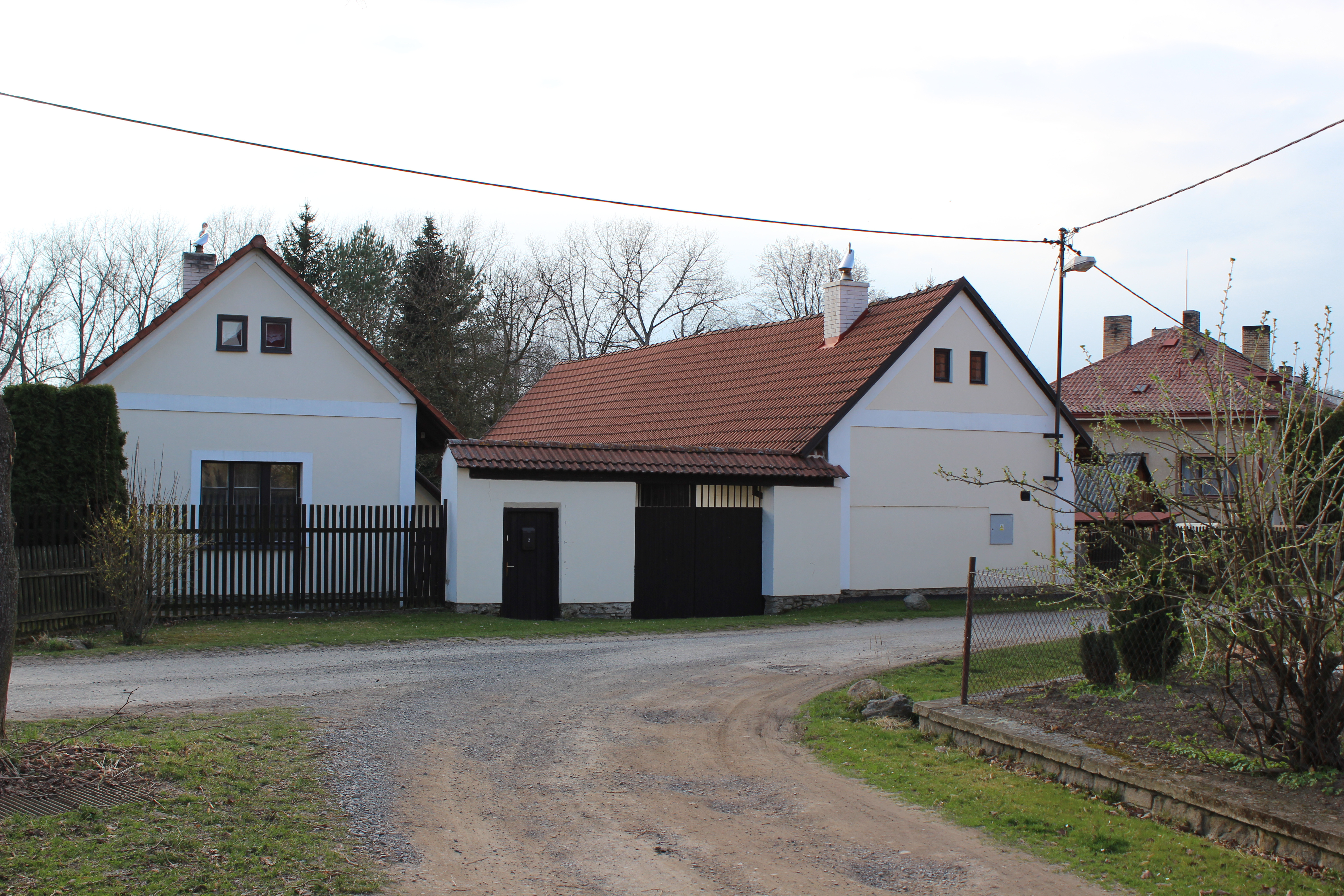 Dům číslo popisné 2 v Zádolí, části Neveklova. This photograph was taken with a Canon EOS 600D.